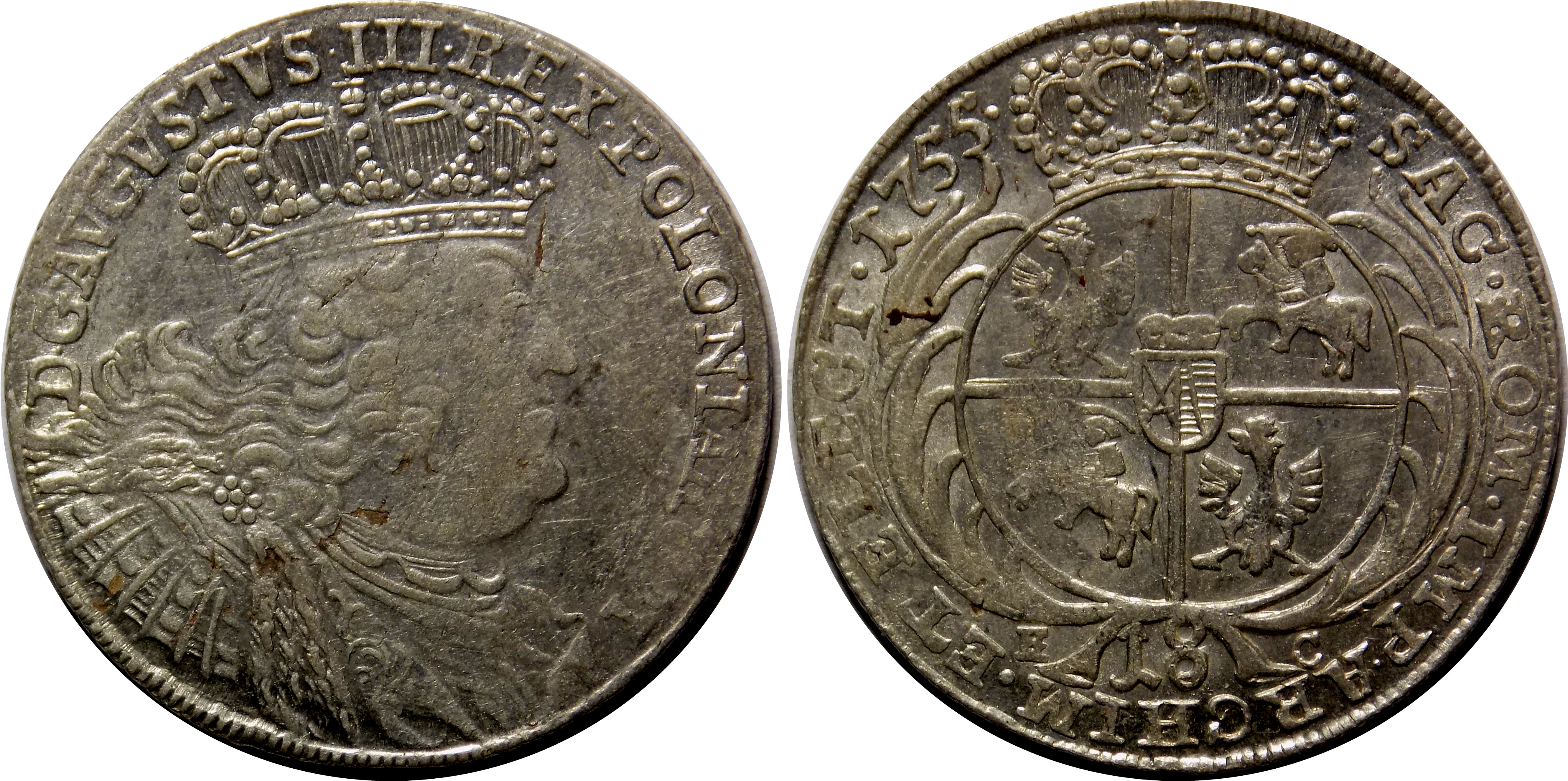 Ort koronny 1755